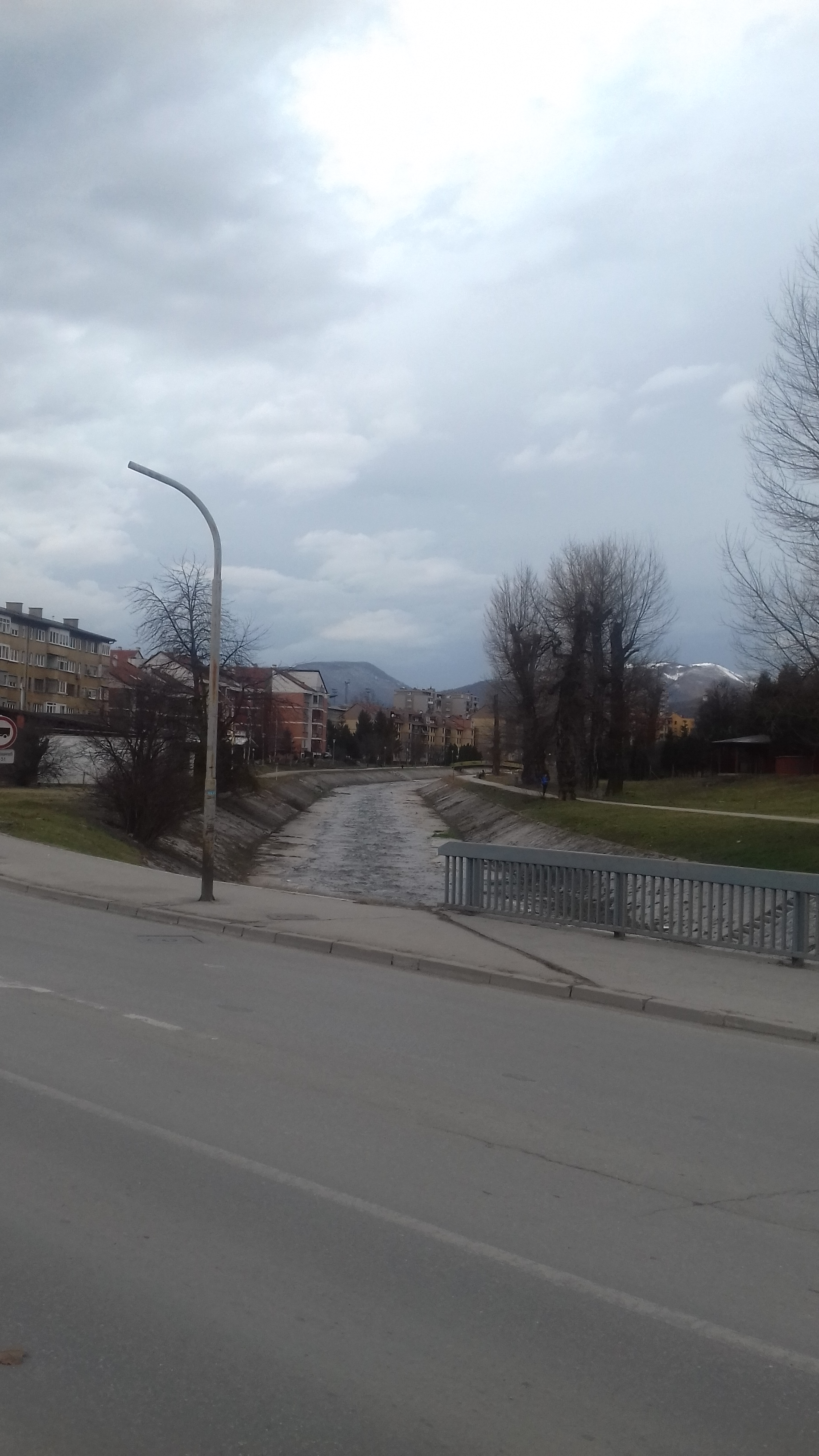 Улаз у Црквице, мост на Бабиној ријеци